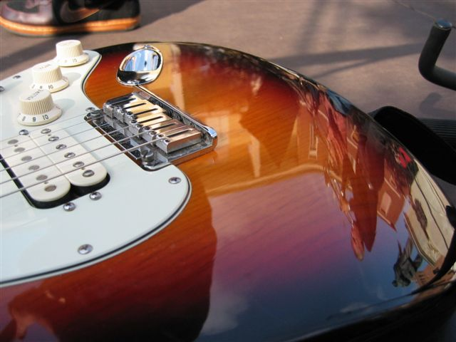 El. guitar, solid body